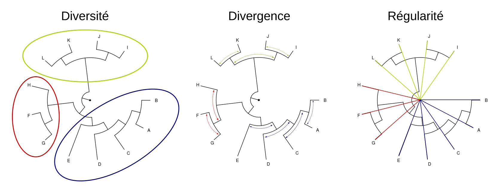 Visualisation des différentes mesures de diversité phylogénétique